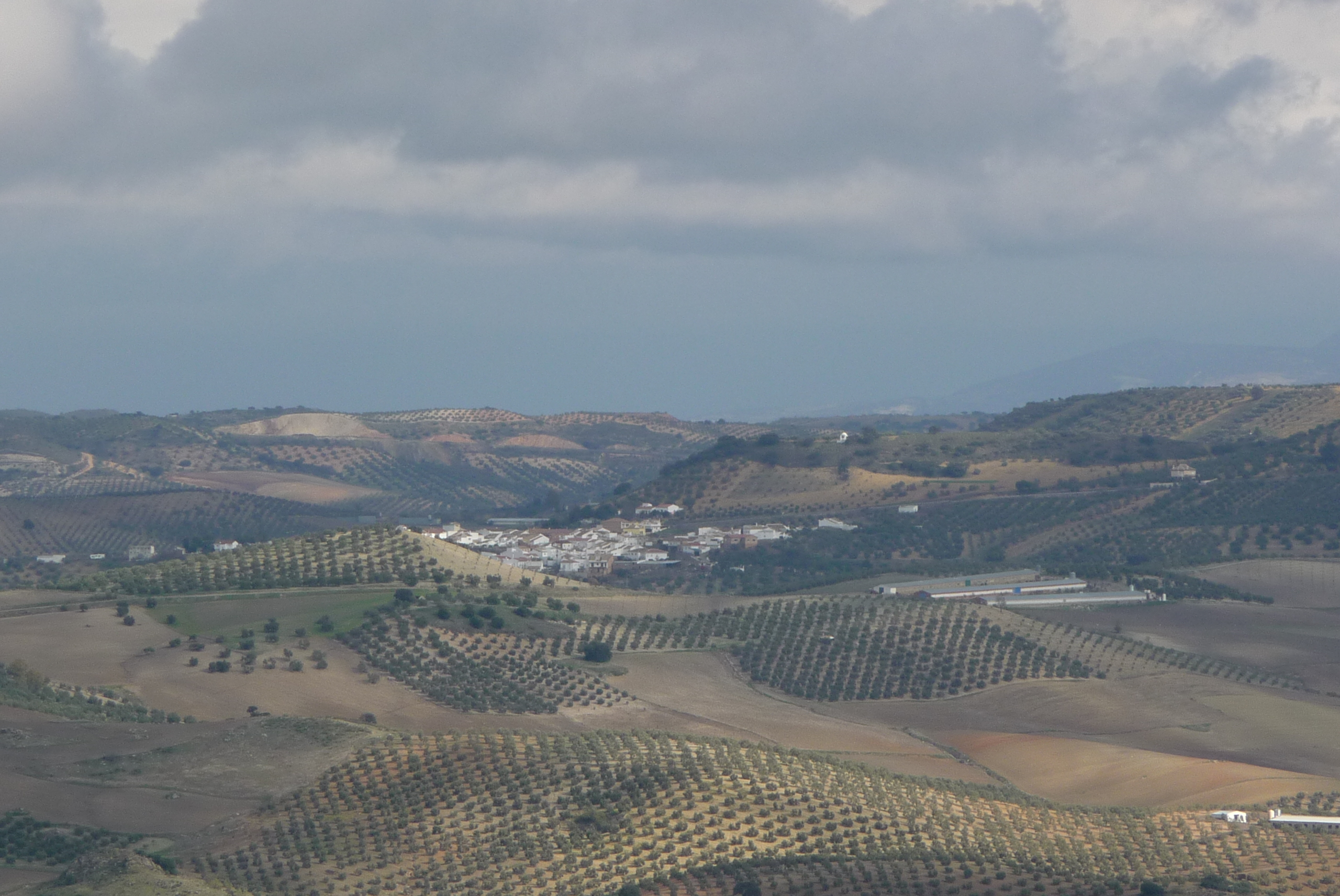 Almargen (Andalusia, Spain).